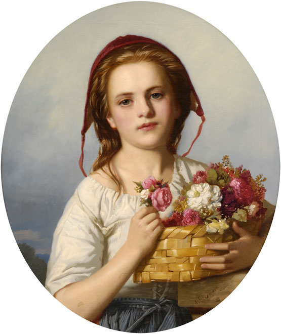 Blumenmädchen, Öl auf Leinwand, 62 x 54 cm